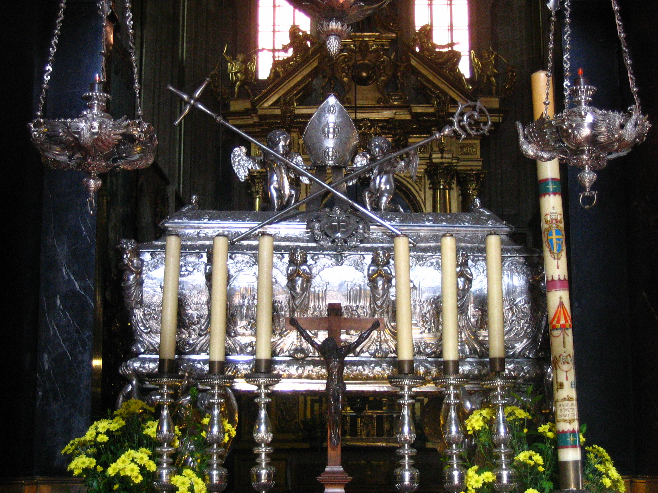 Konfesja bp Stanisława na Wawelu Wawel Cathedral